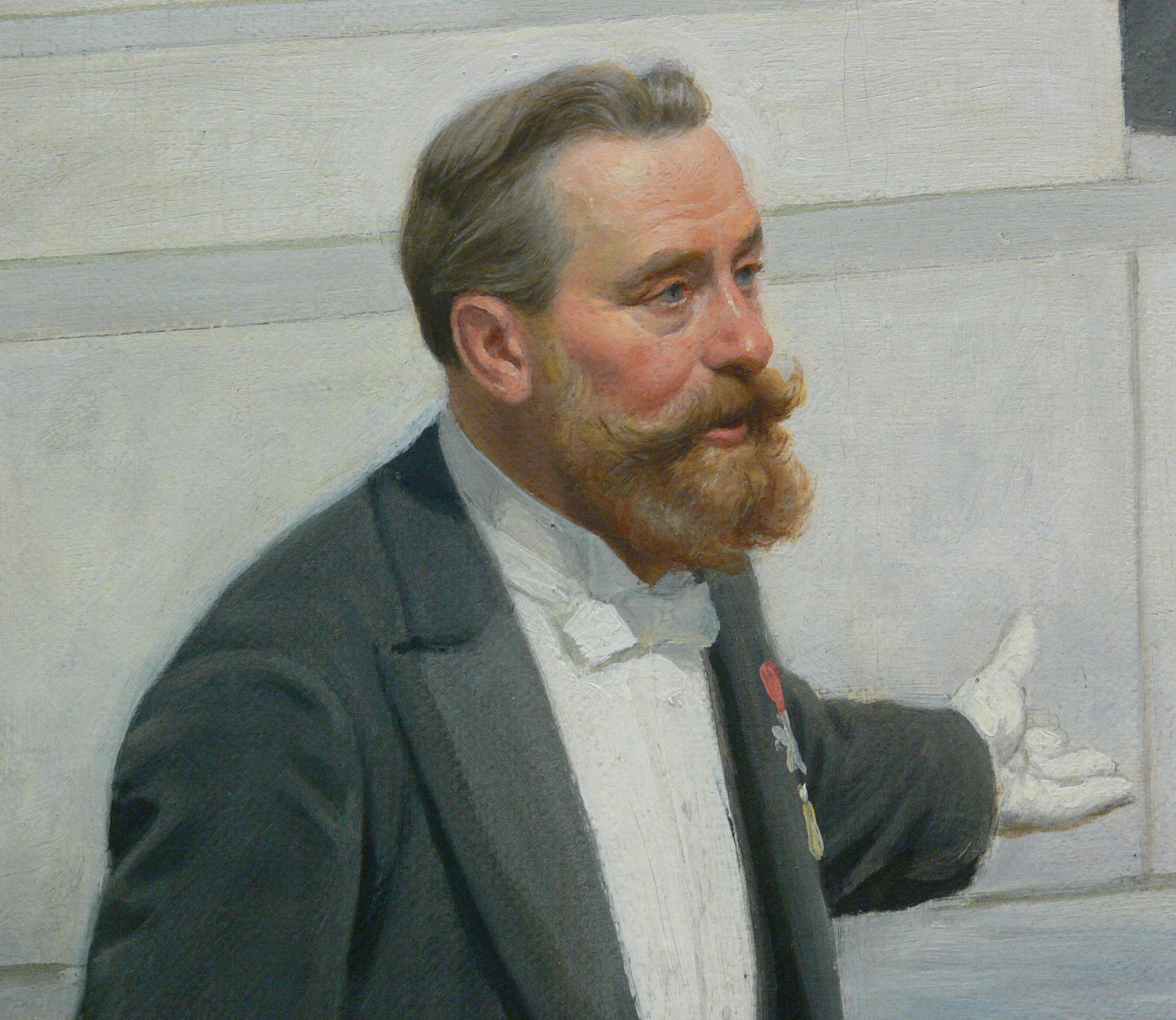 Anton von Werner: Enthüllung des Richard-Wagner-Denkmals im Tiergarten, Öl auf Leinwand, 1908 Berlinische Galerie Native nameBerlinische GalerieLocationBerlinCoordinates52° 30′ 15″ N, 13° 23′ 56″ E Established1975, 2004 (moved to present quarters)Website Detail: Porträt des Stifters Ludwig Leichner